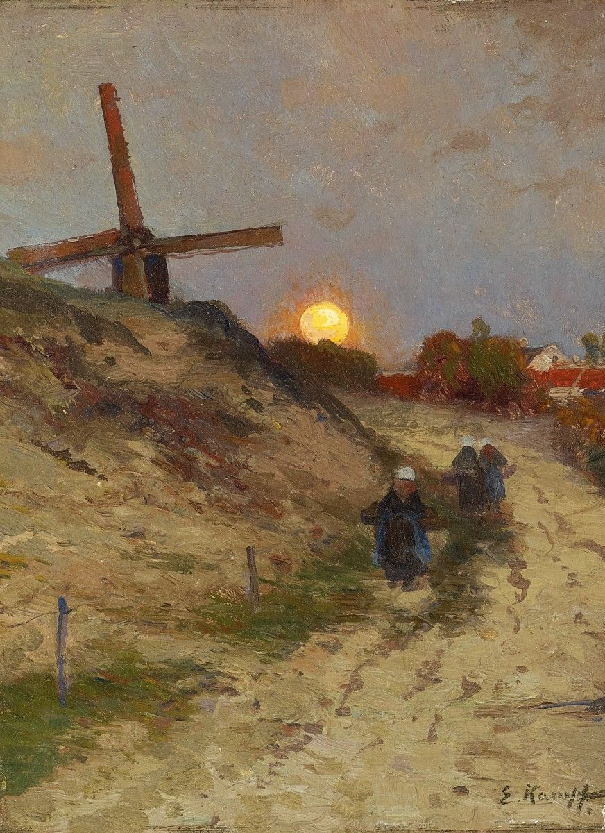 Mondaufgang in den Dünen. Unten rechts: E. Kampf. Öl auf Holz. 21 x 15,5 cm.